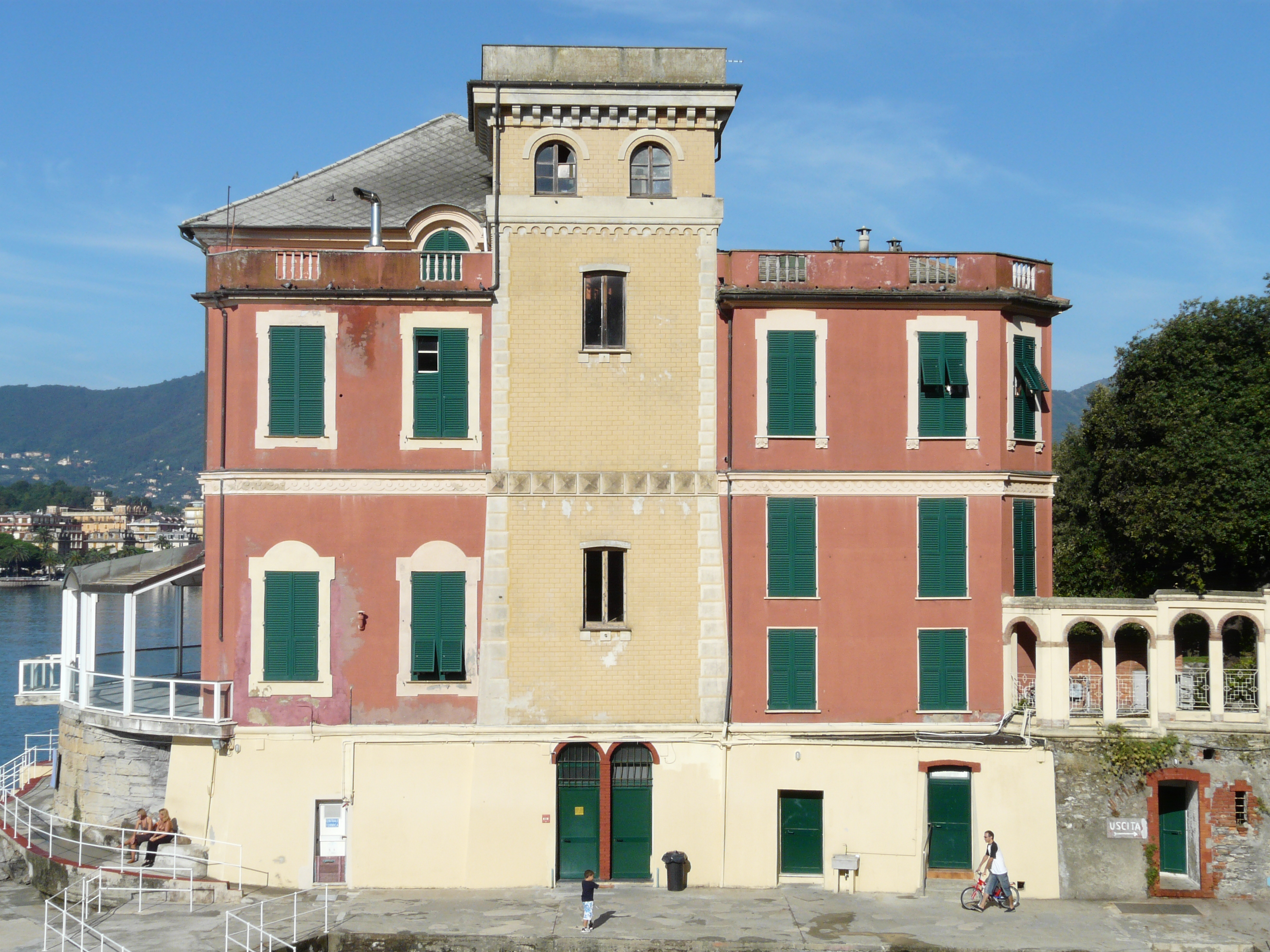 Villa Porticciolo, Rapallo, Liguria, Italia